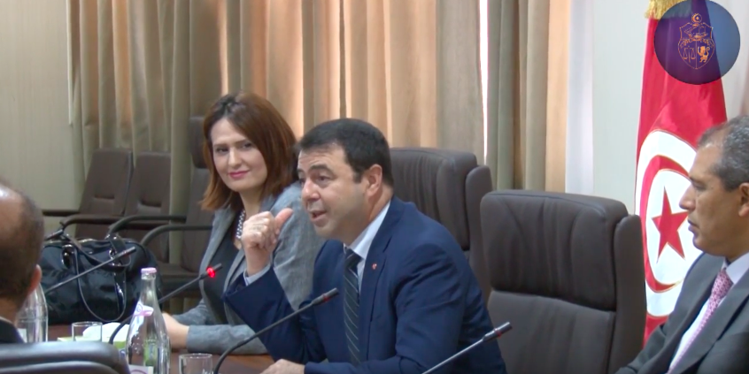 Reunion entre le ministre tunisien de l'intérieur Hédi Majdoub et la ministre tunisienne de la jeunesse et des sports Majdouline Cherni, le 6 septembre 2016.